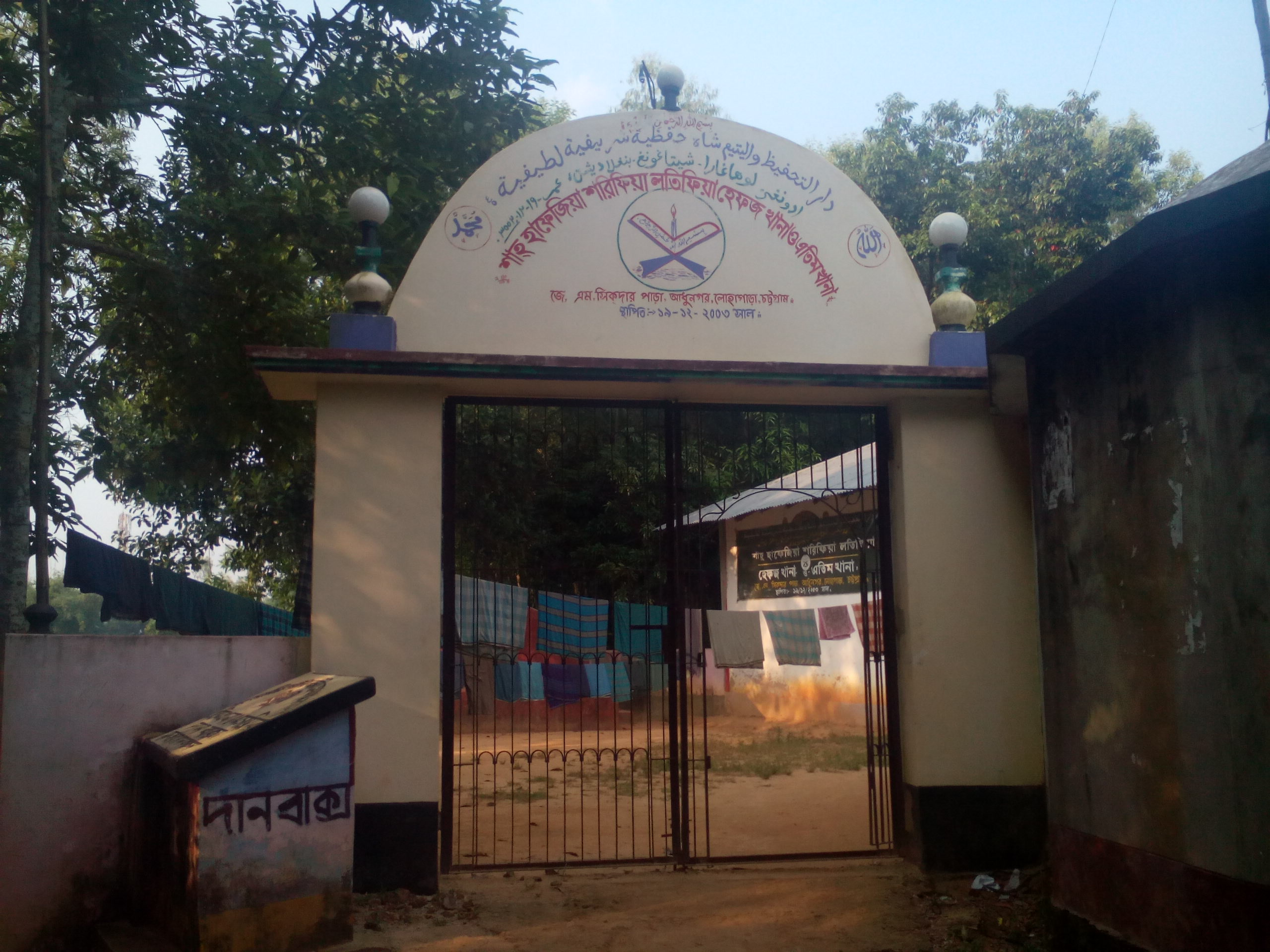 আধুনগর হাফেজিয়া শরীফিয়া লতিফিয়া মাদ্রাসা ও এতিমখানা